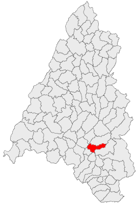 Categorie:Hărţi ale judeţului Bihor